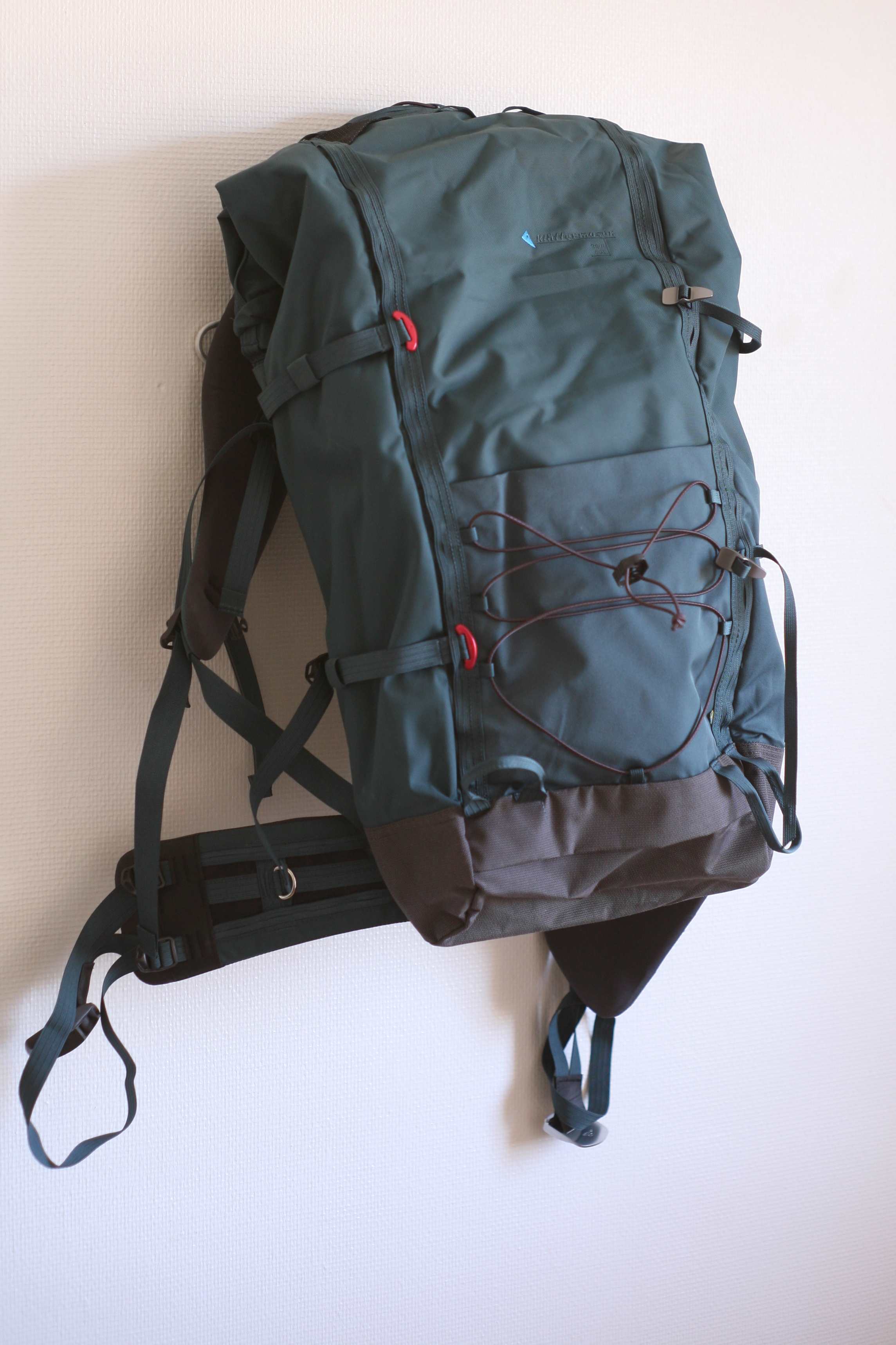 Ryggsäck från den svenska tillverkaren Klättermusen.